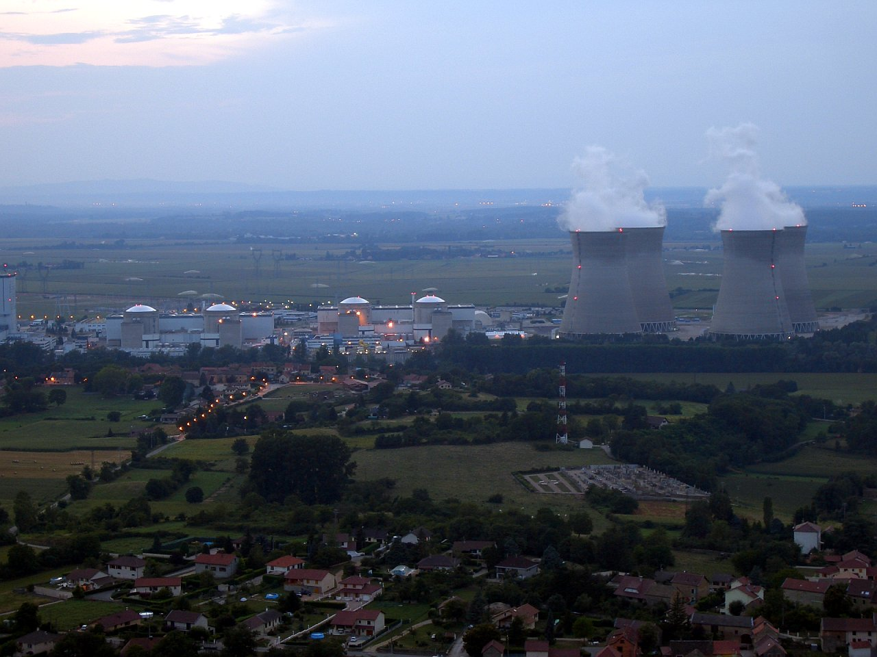 Centrale nucléaire du Bugey. Photo prise du plateau de Larina.